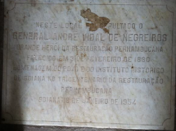 Placa referente ao sepultamento de André Vidal de Negreiros, localizada na capela Santo Antônio em Goiana - Pernambuco